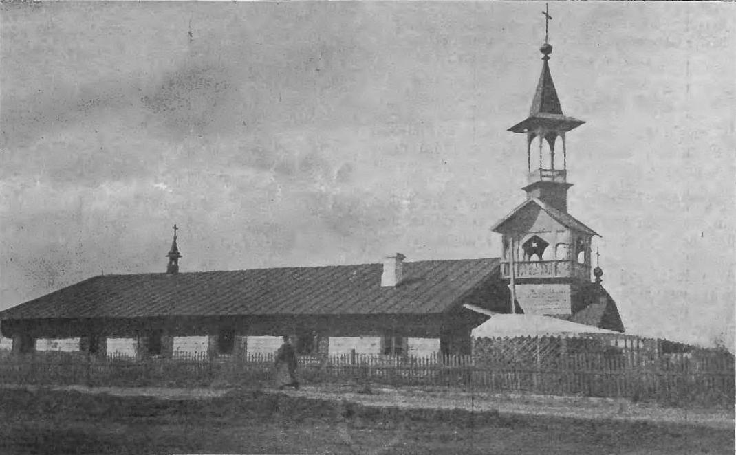 Polski kościół w Charbinie (1906)